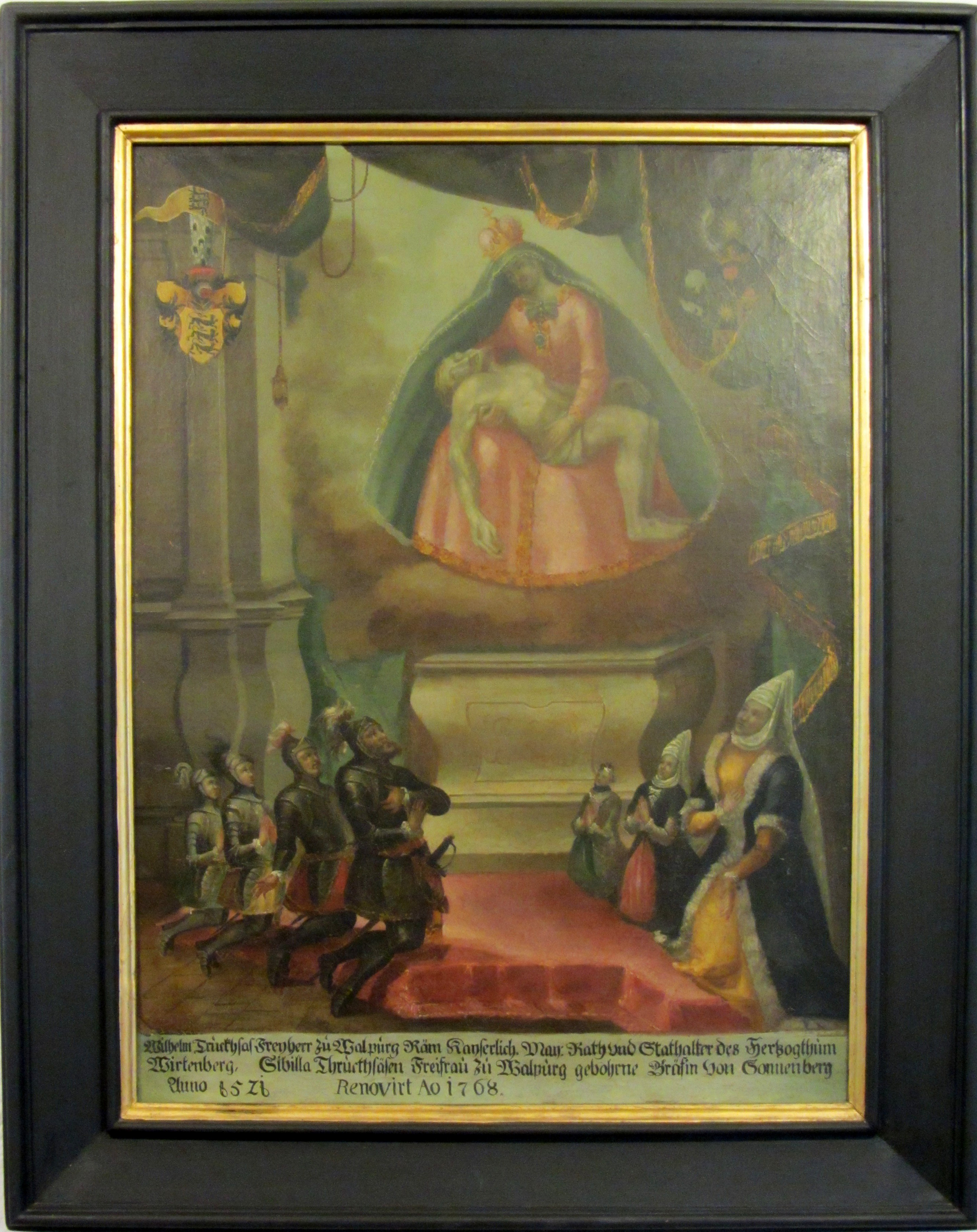 Stifterbild Adelshaus Waldburg, Wallfahrtskirche auf dem Bussen